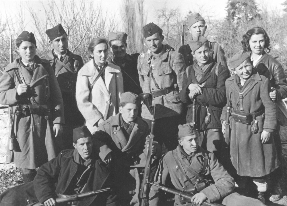 Omladinska delegacija Druge proleterske brigade sa komandantom Druge proleterske divizije Pekom Dapčevićem u Livnu 21. decembra 1942. godine